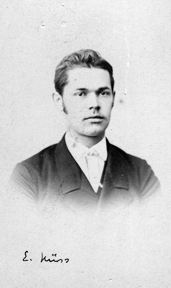 Portrait d'Emile Küss jeune (date inconnue)